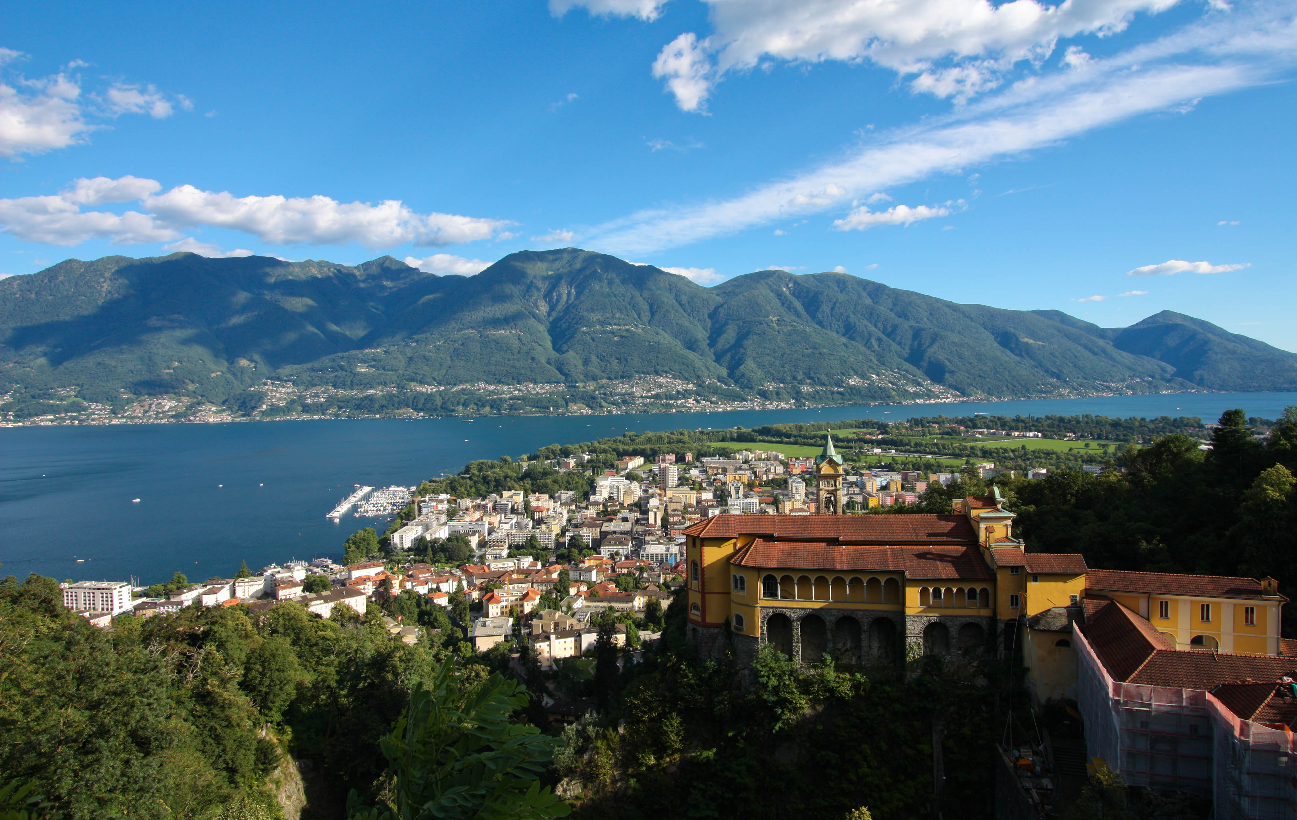 Locarno